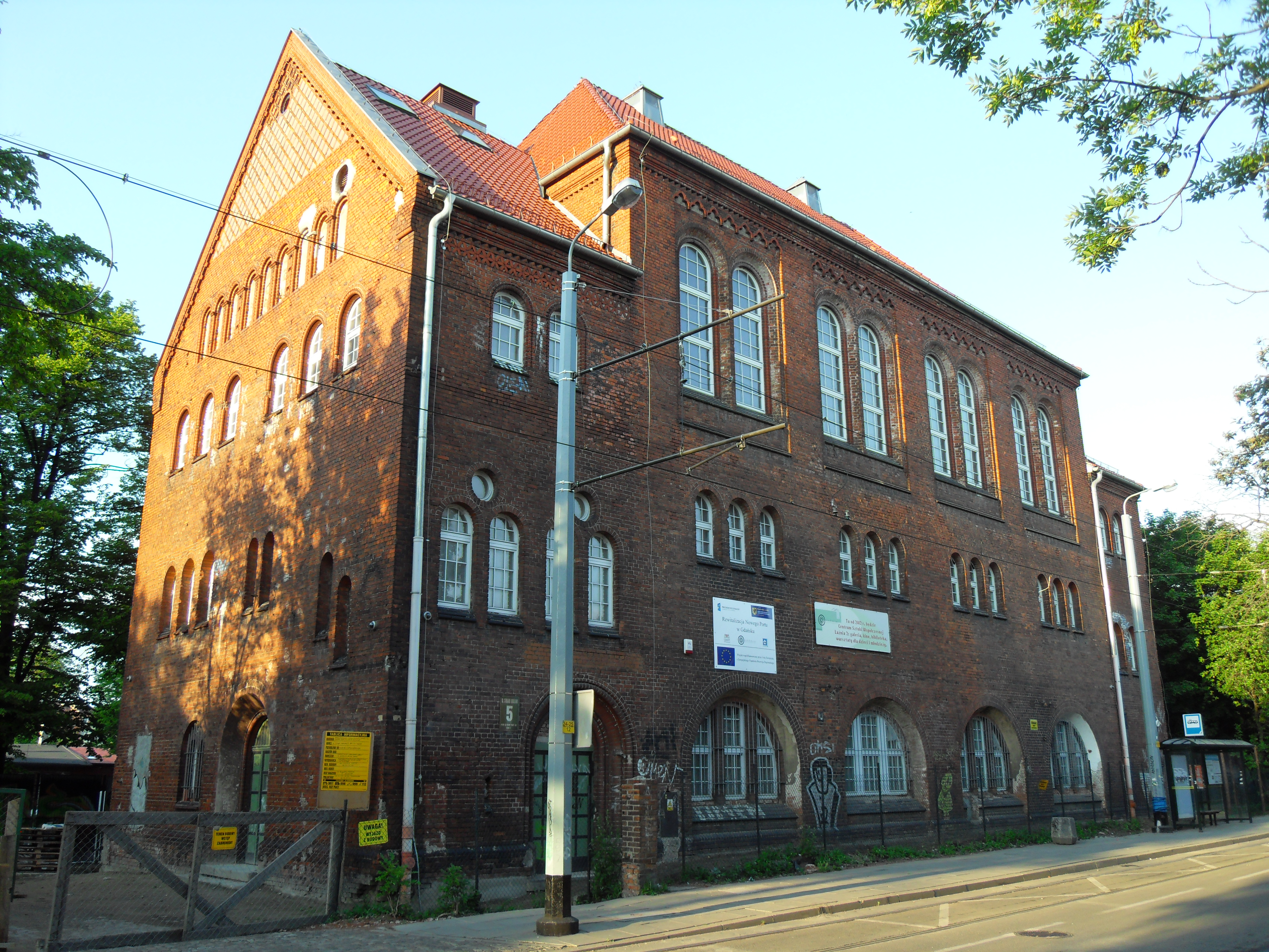 Gdańsk Nowy Port. Dawna łaźnia, ul. Strajku Dokerów 5.